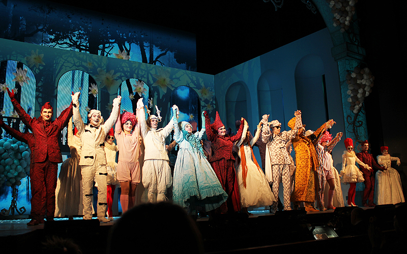 Поклон артистов мюзикла «Всё о Золушке»